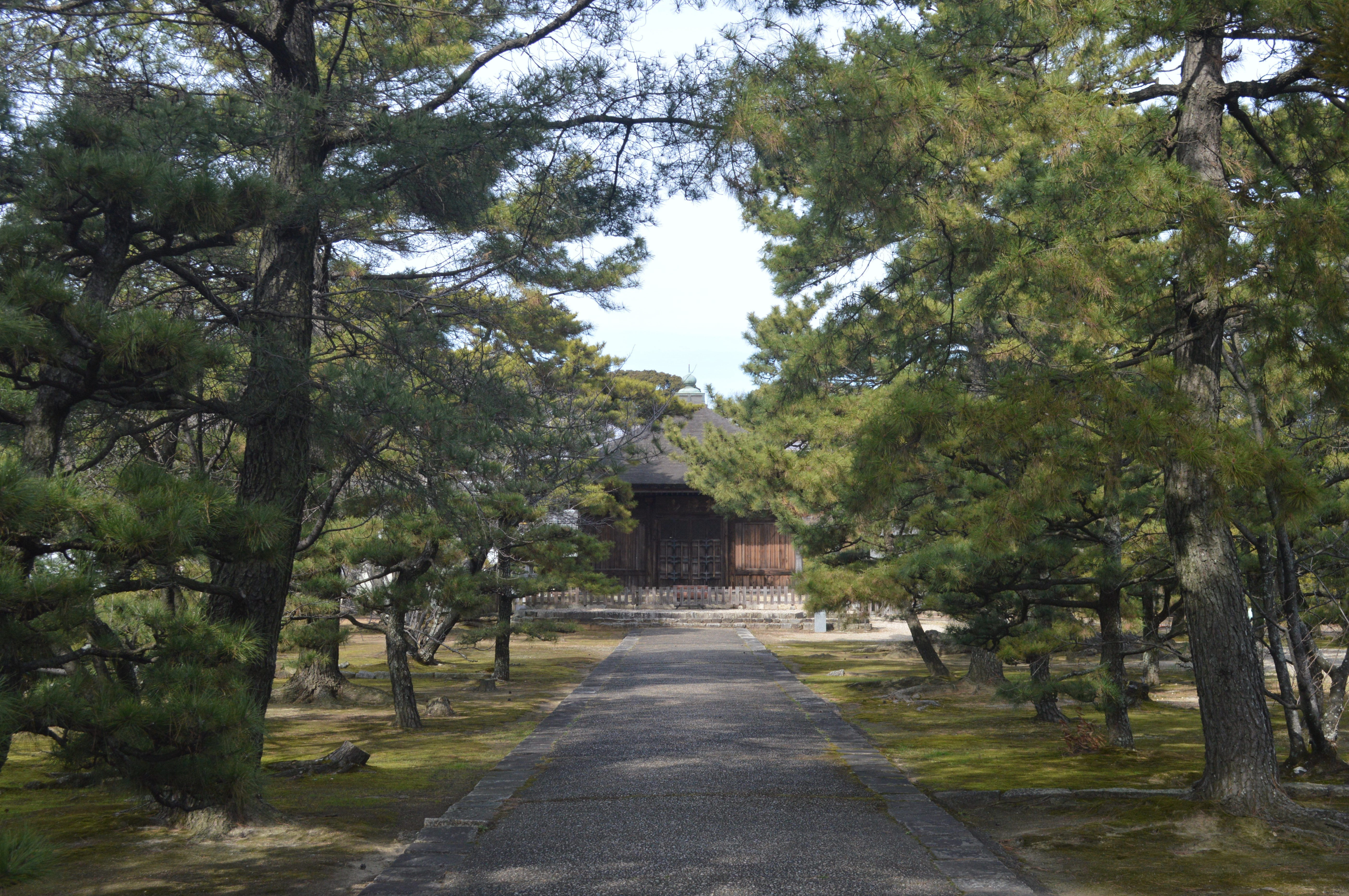 愛知県西尾市上町下屋敷15にある実相寺。